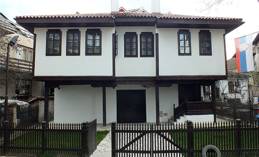 Зграда у којој је смештена библиотека